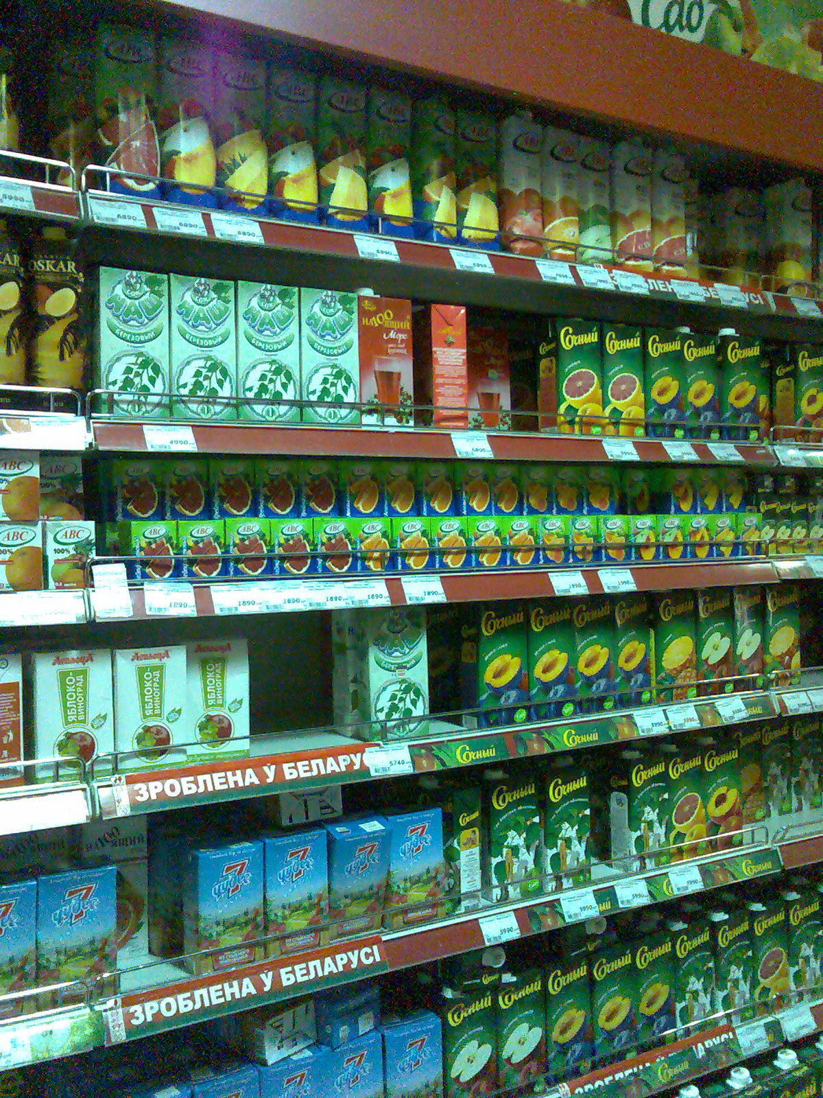 Соки в асептической упаковке